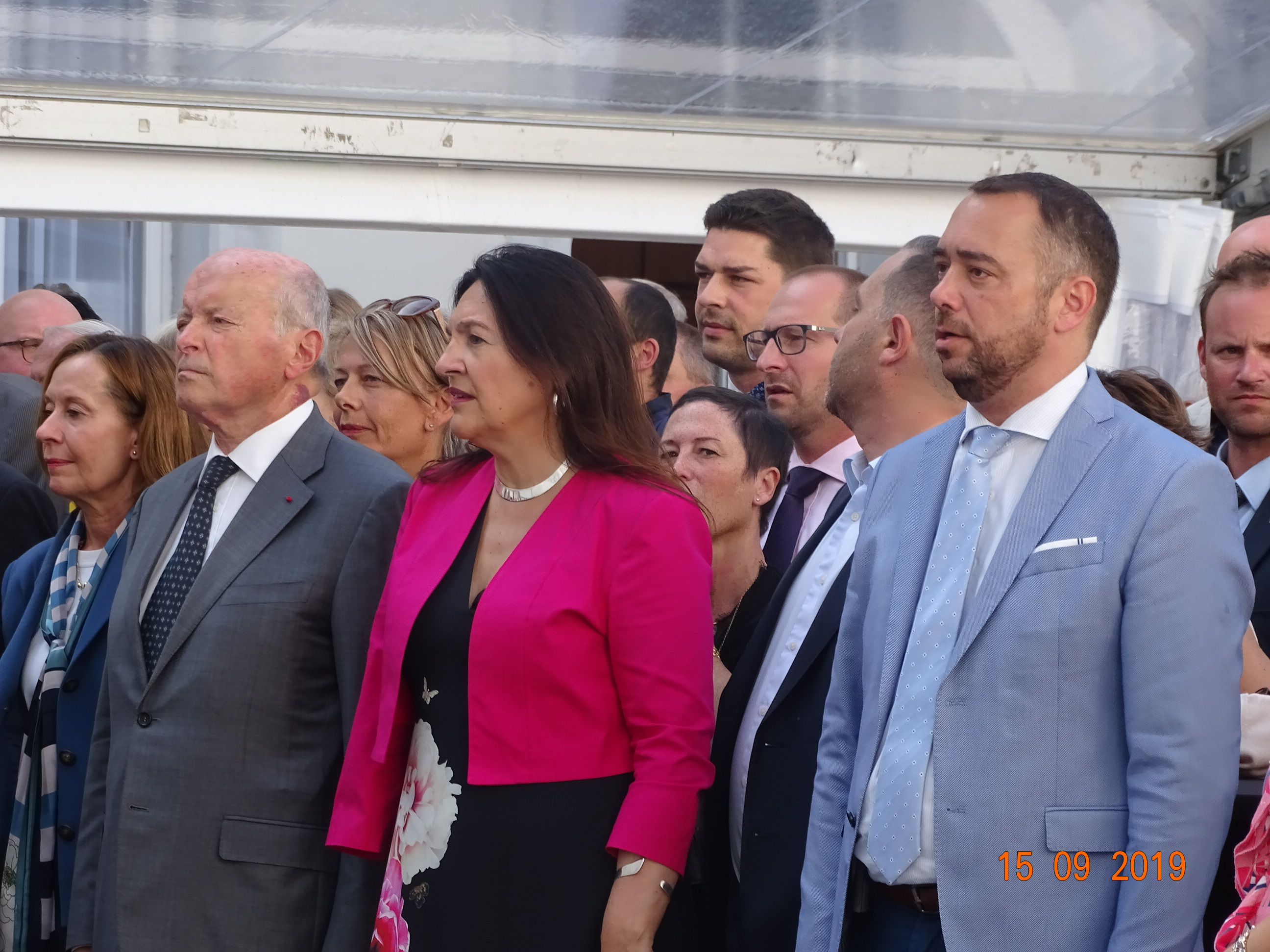 fetes de wallonie 2019